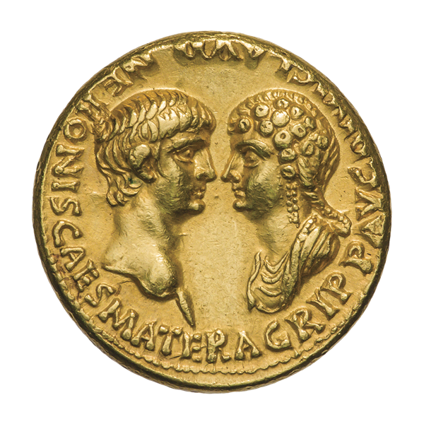 Ауреус. Агриппина Младшая и Нерон. Ок. 54 г. (аверс). Надпись AGRIPP AVG DIVI CLAVD NERONIS CAES MATER. Бюсты Агриппины Младшей и Нерона, напротив друг друга.